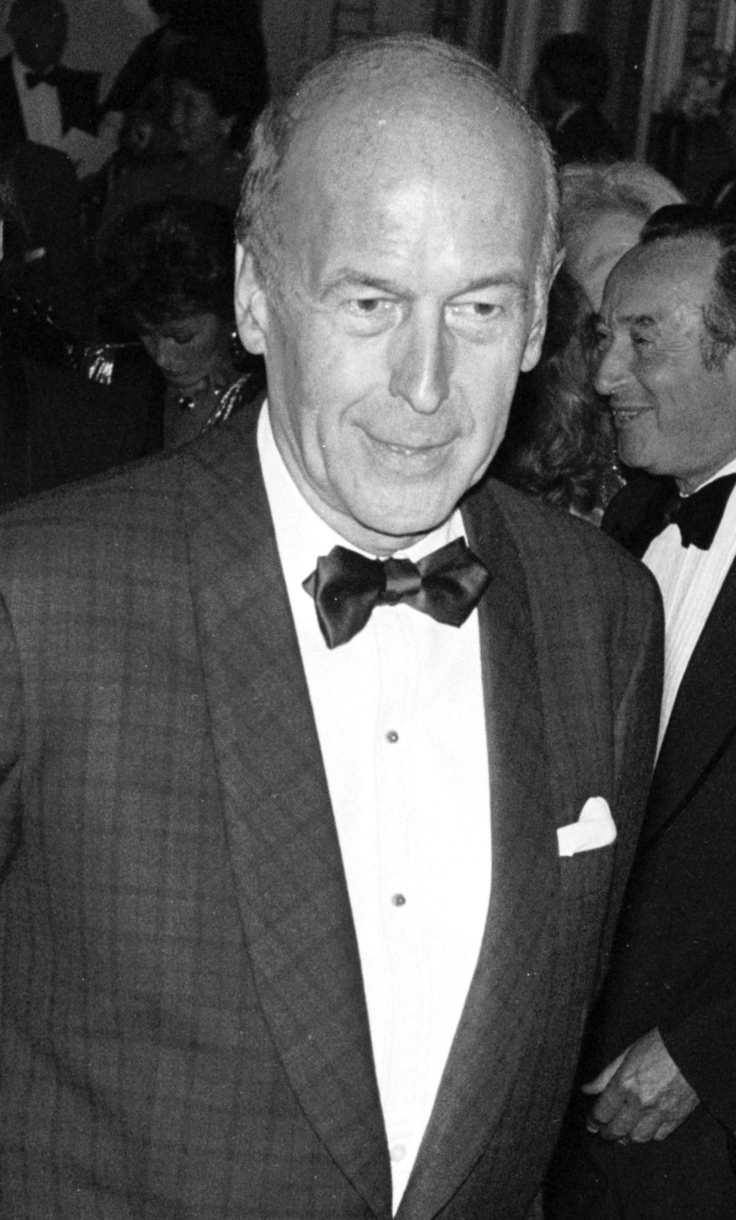 Valéry Giscard d'Estaing à Deauville (Normandie, France) en septembre 1986.